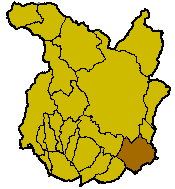 Localisation de la commune de Quarrata à l'intérieur de la province de Pistoia.